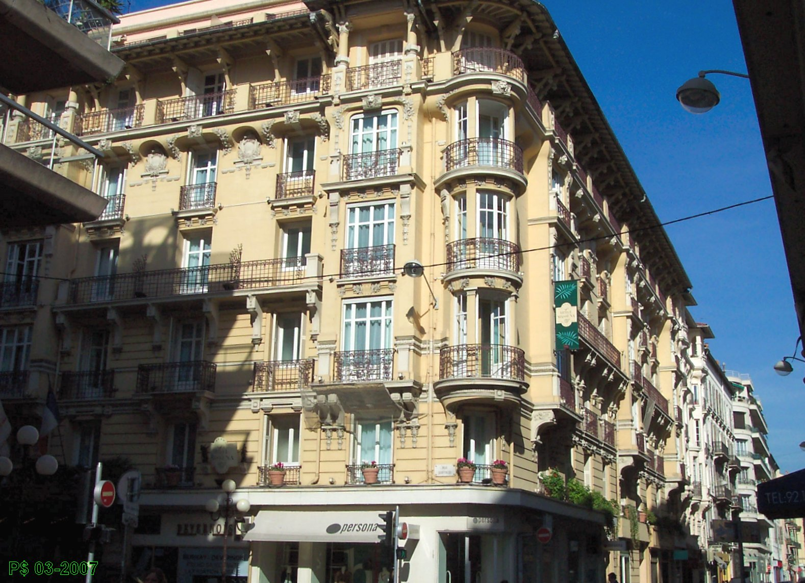 Nice-Carabacel. Hotel Masséna